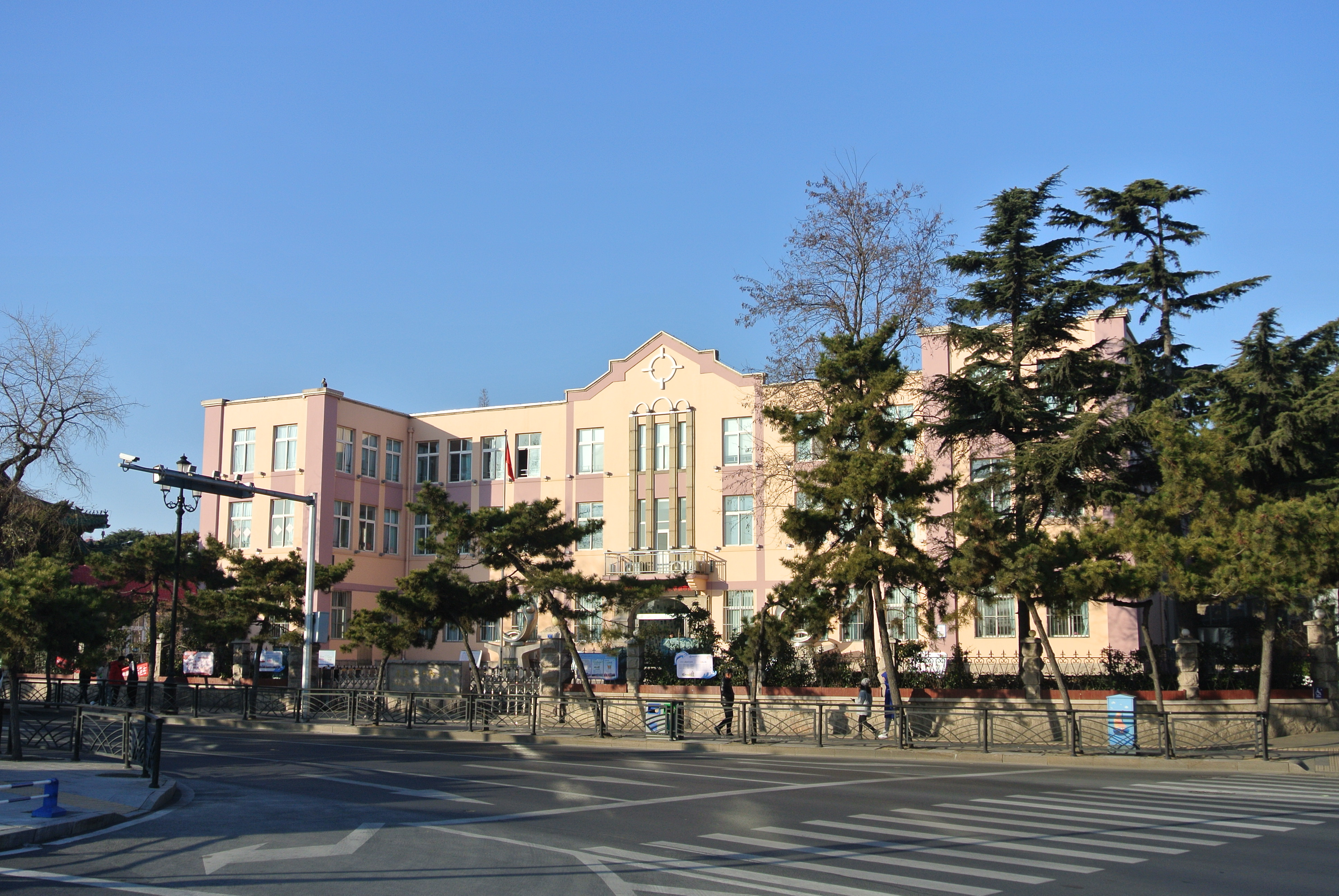 青岛太平路小学